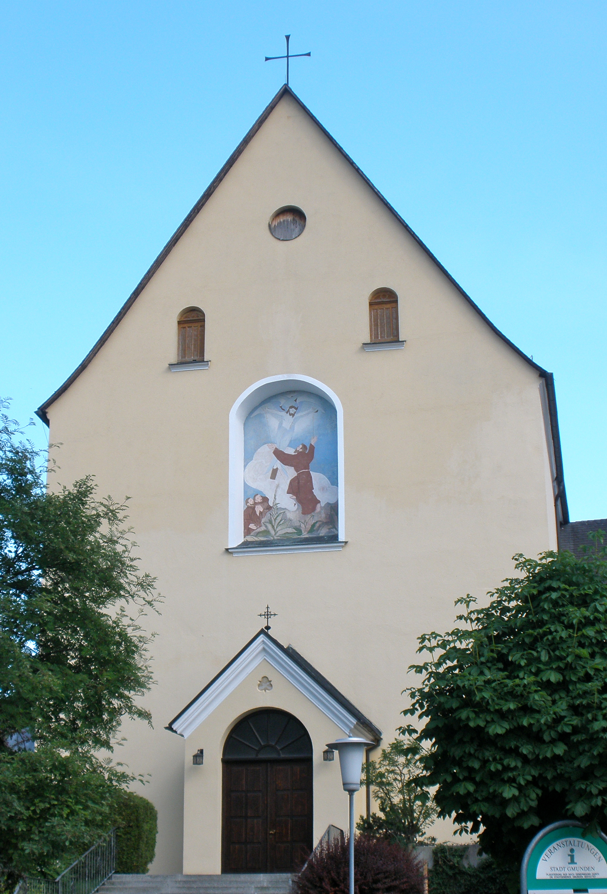 Die Grundsteinlegung zur Gmundner Kapuzinerkirche erfolgte am 5. Oktober 1636; nach neunjähriger Bauzeit wurde sie am 25. November 1645 eingeweiht.